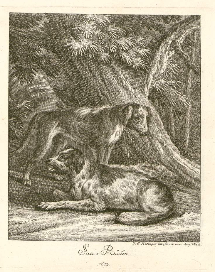 Bildunterschrift: "Sau-Rüden N. 12."